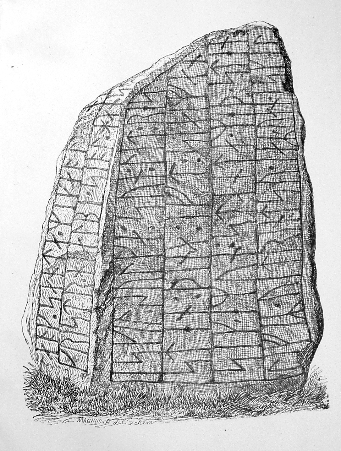 Tillitse-stenen er en runesten fra cirka 1050, der står uden for Tillitse Kirke i den lille by Tillitse på Lolland (Tillitse Sogn, Lolland Kommune)